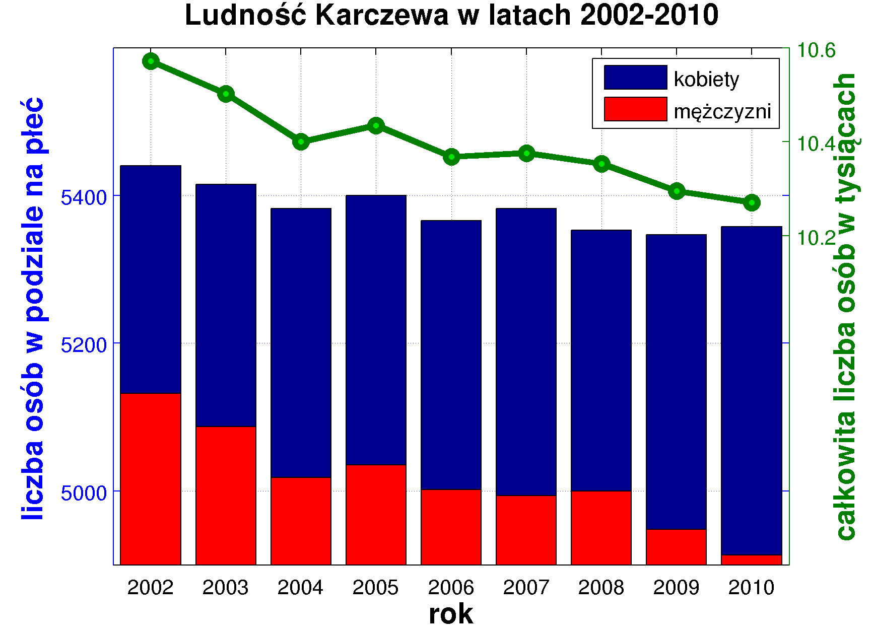 Wykres przedstawiąjący zmianę liczby lidności Karczewa w latach 2002-2010. Źródło danych